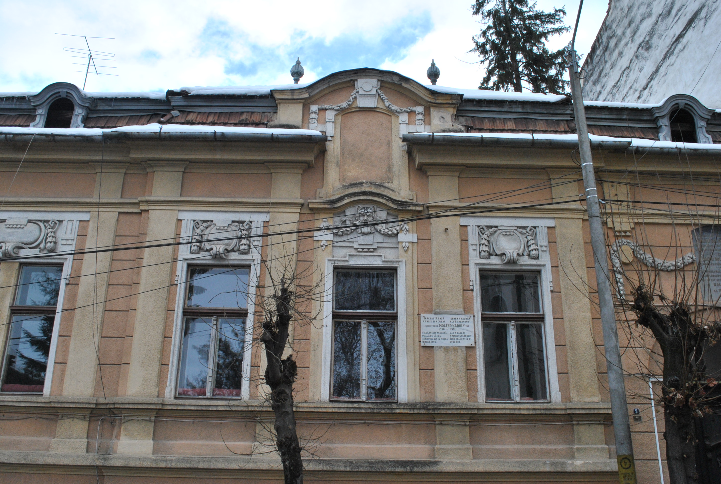 Casa Bolyai